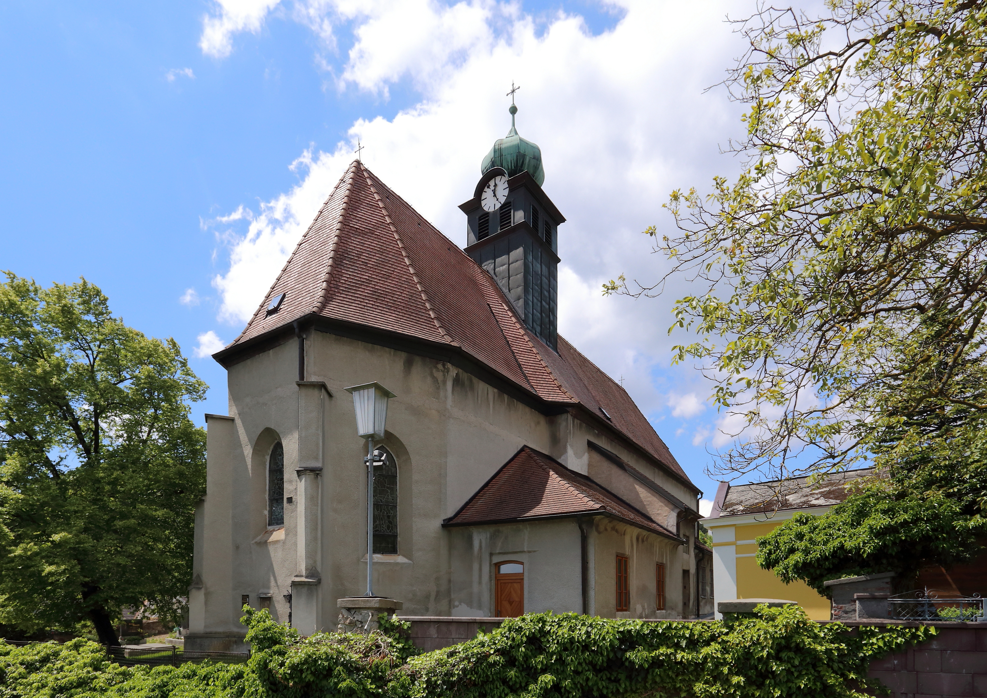 Nordostansicht der katholischen Pfarrkirche hl. Michael in der niederösterreichischen Marktgemeinde Grünbach am Schneeberg. Eine spätgotische Saalkirche mit einem polygonal schließenden Chor und einem Dachreiter, der 1907 erneuert wurde.